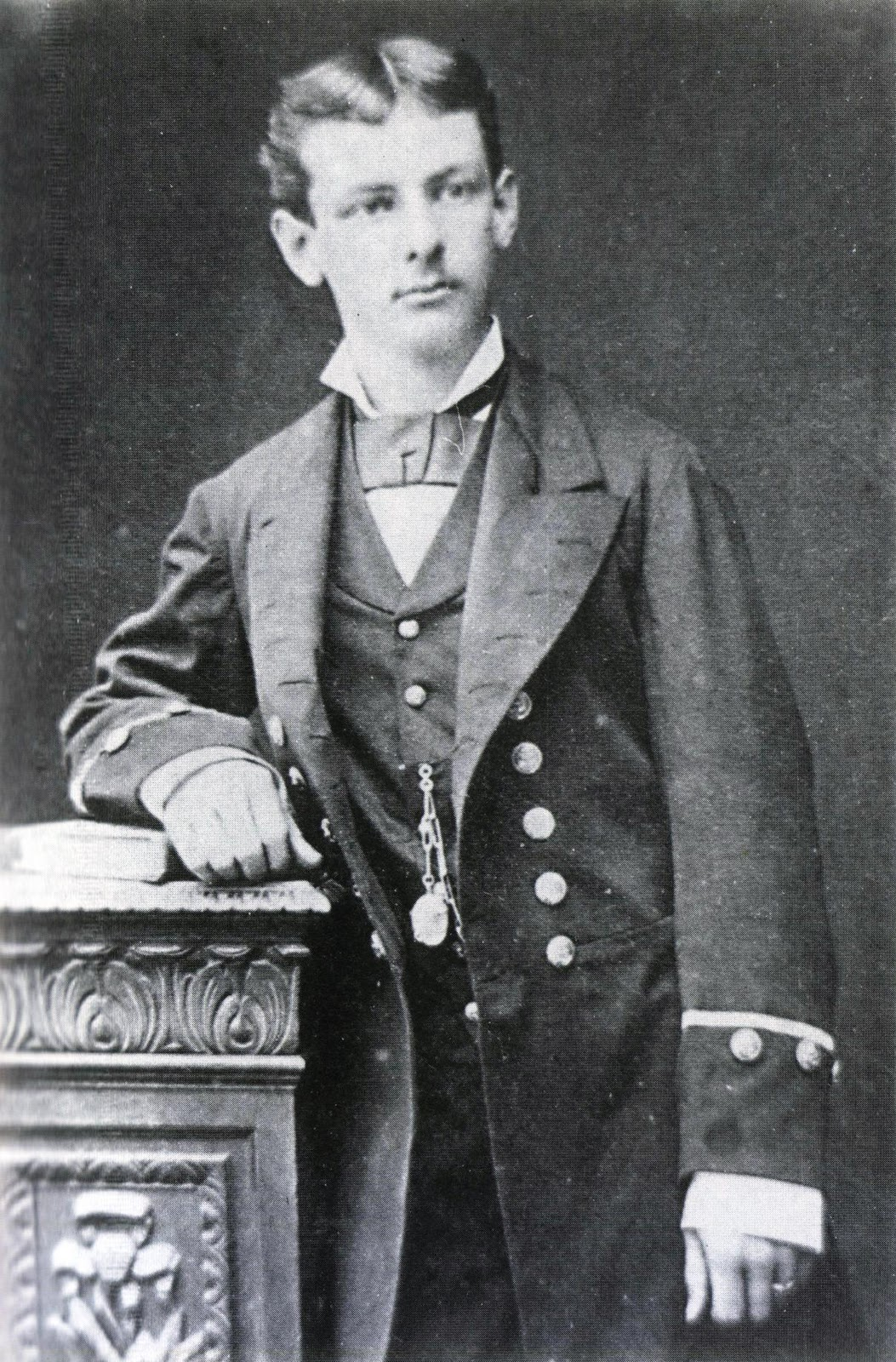 Teniente Jorge Velarde